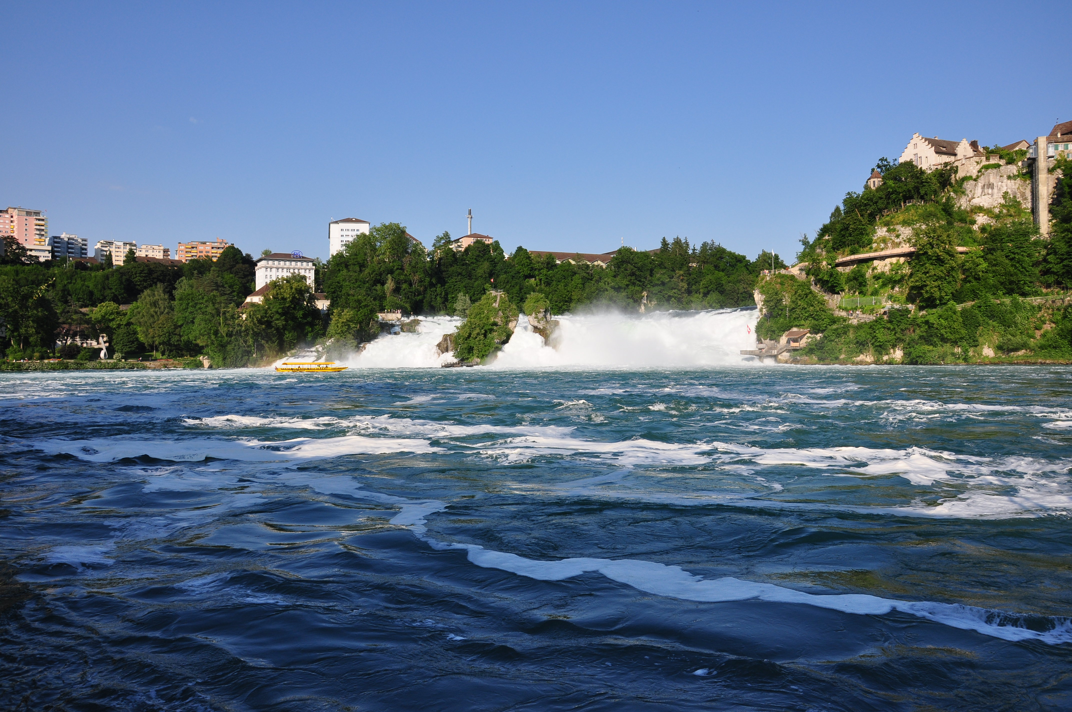 Neuhausen am Rheinfall, Rheinfall and Schloss Laufen in Laufen-Uhwiesen as seen from Schlösschen Wörth (Switzerland)